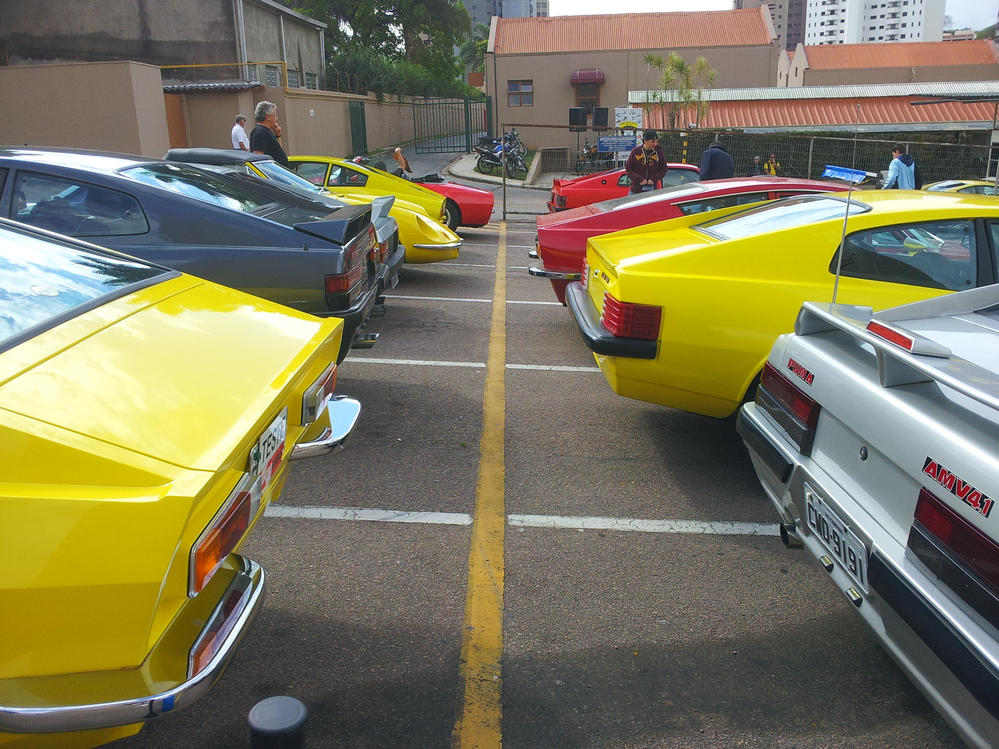 5º encontro Puma Jundiaí 2012_"Bulevar Beco Fino"_Av.Nove de Julho.